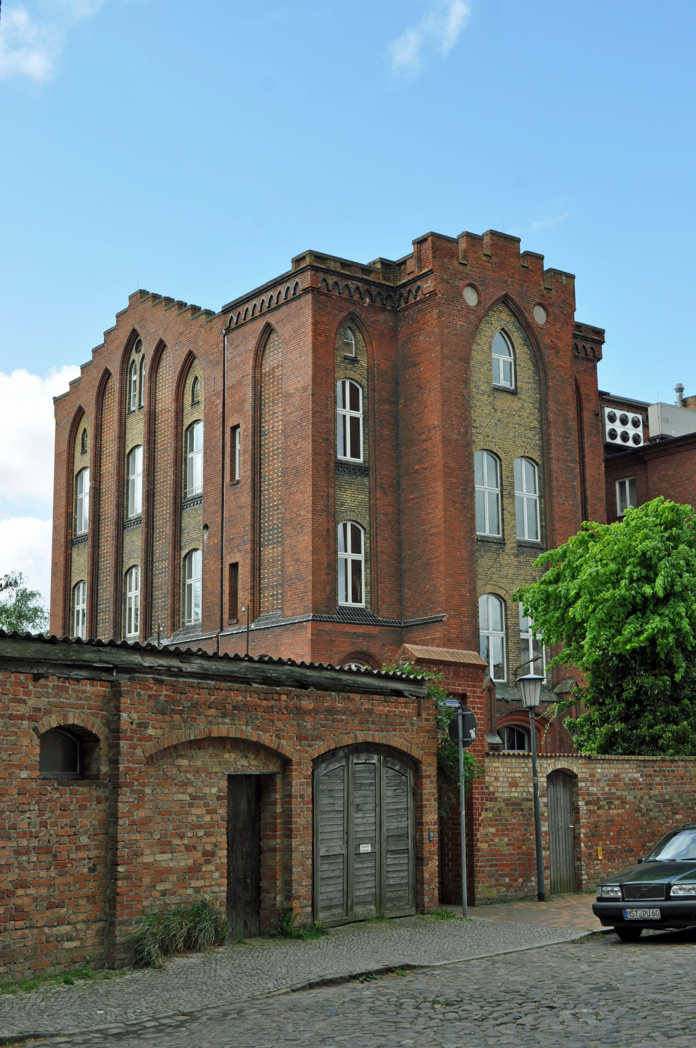 Gebäude in Stralsund, siehe Dateiname